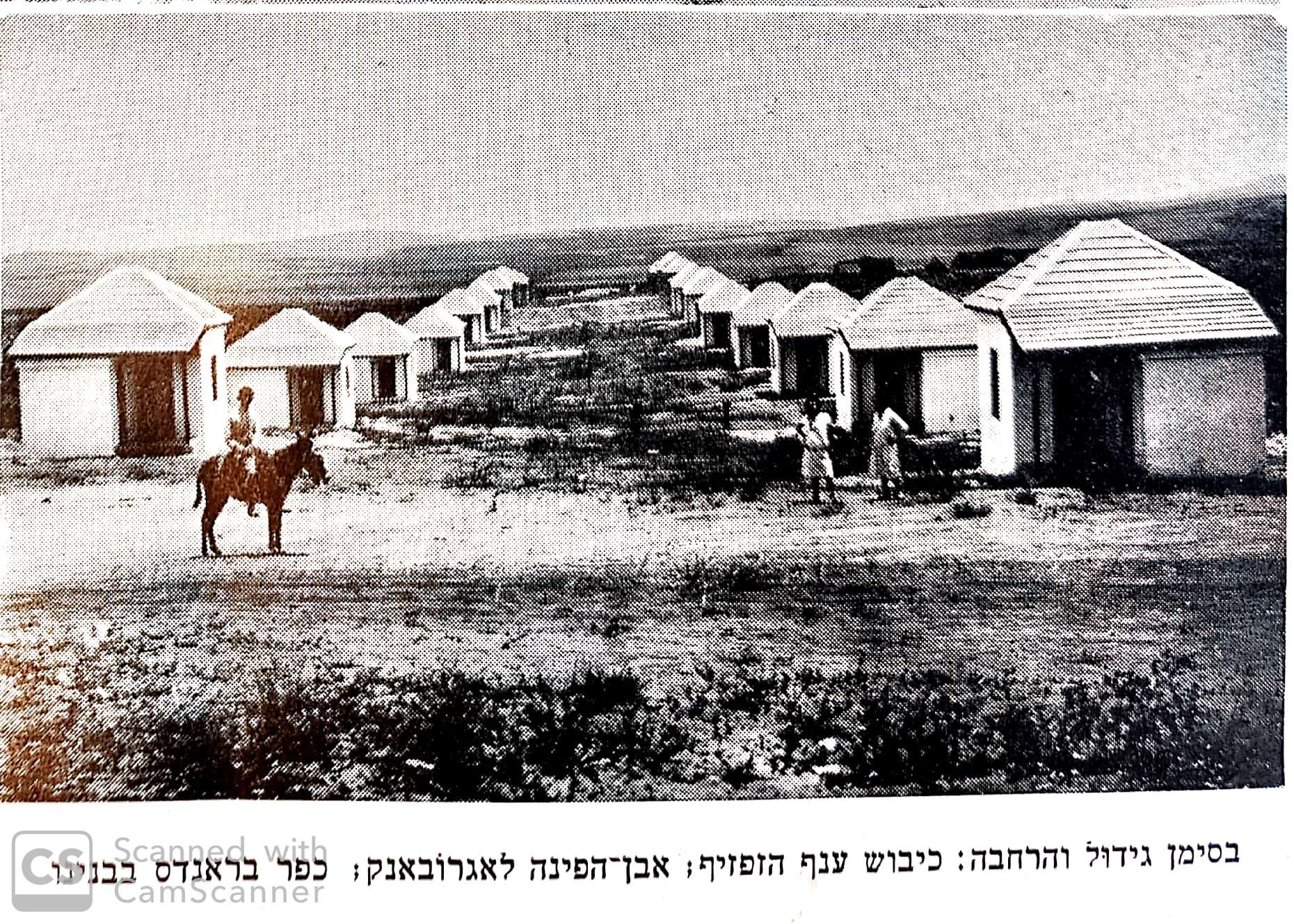 שכונת ברנדייס בחדרה בזמן הקמתה - 1927